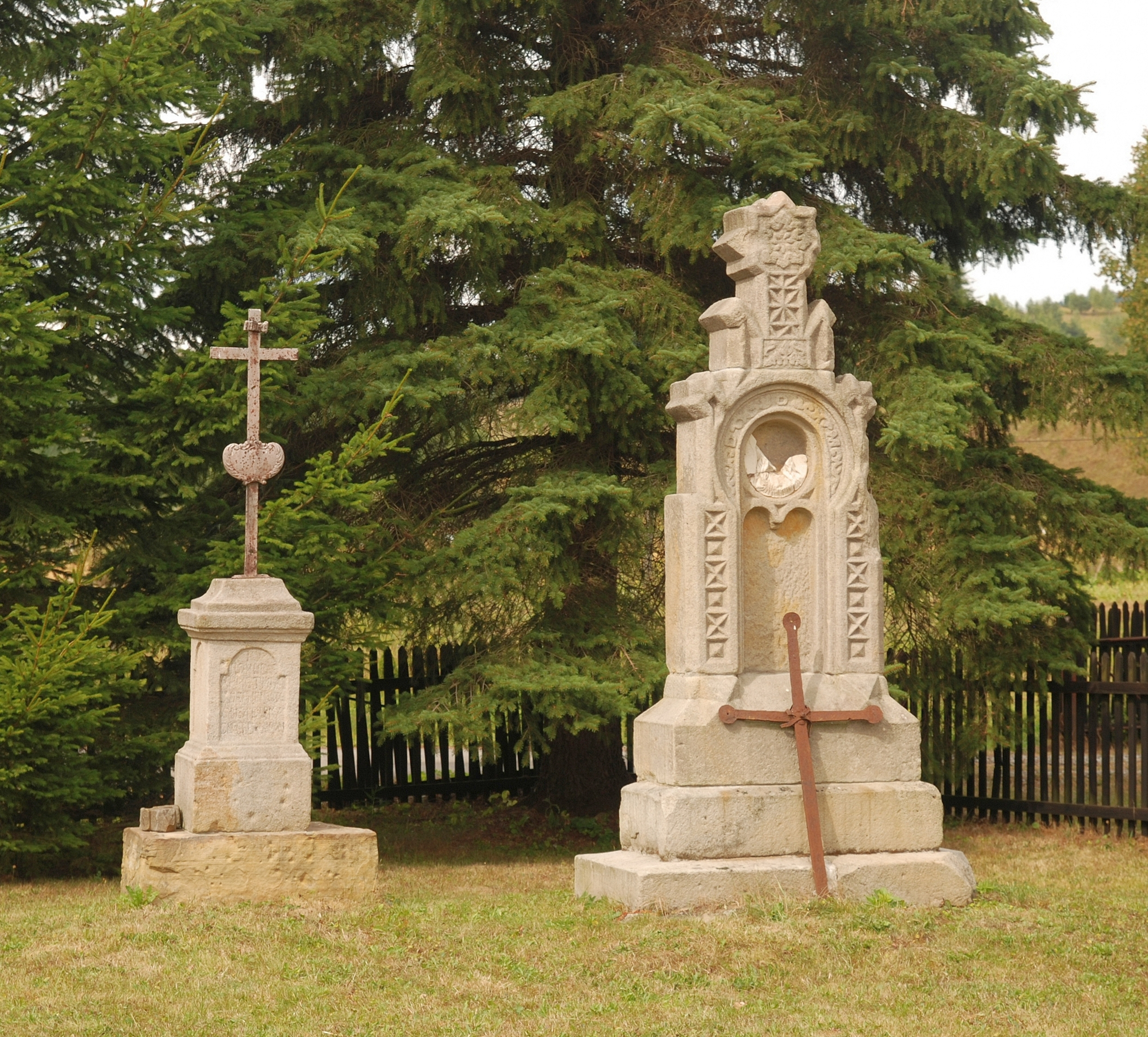 wieś Polany